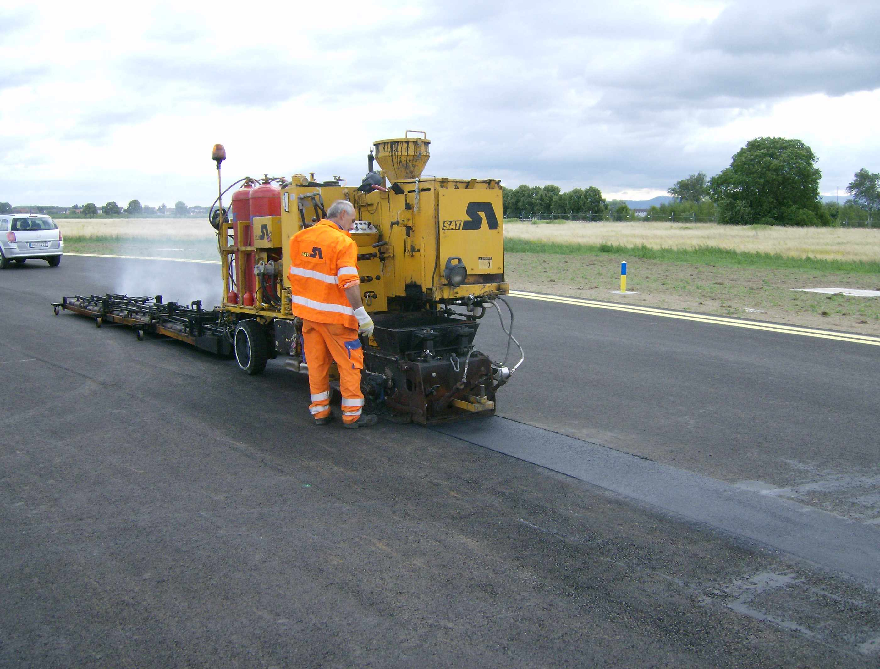 Herstellung einer Mittelnahtsanierung im heiß an heiß Einbau mittels Nahtremixer